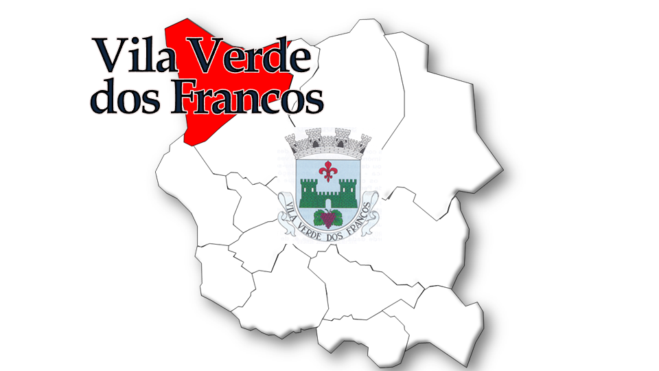 Evolução da População